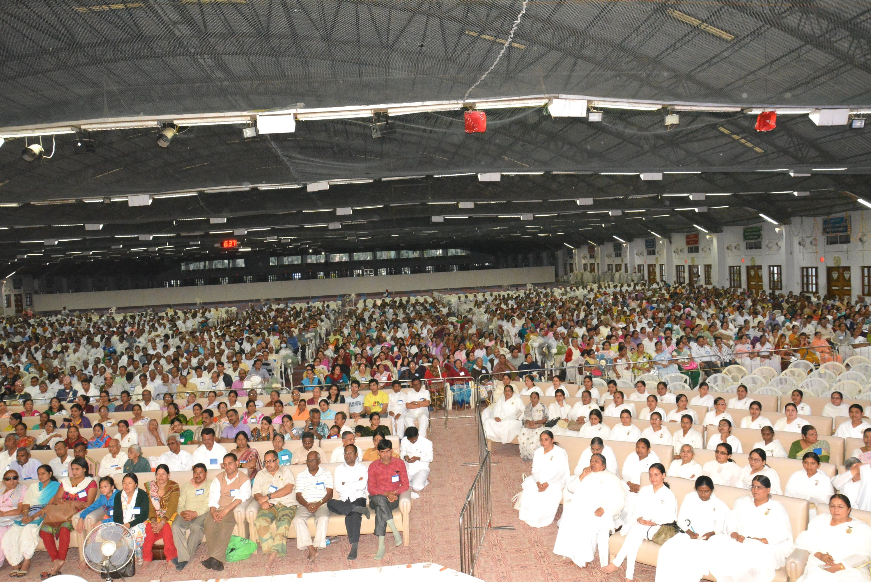 Shantivan Diamond Hall